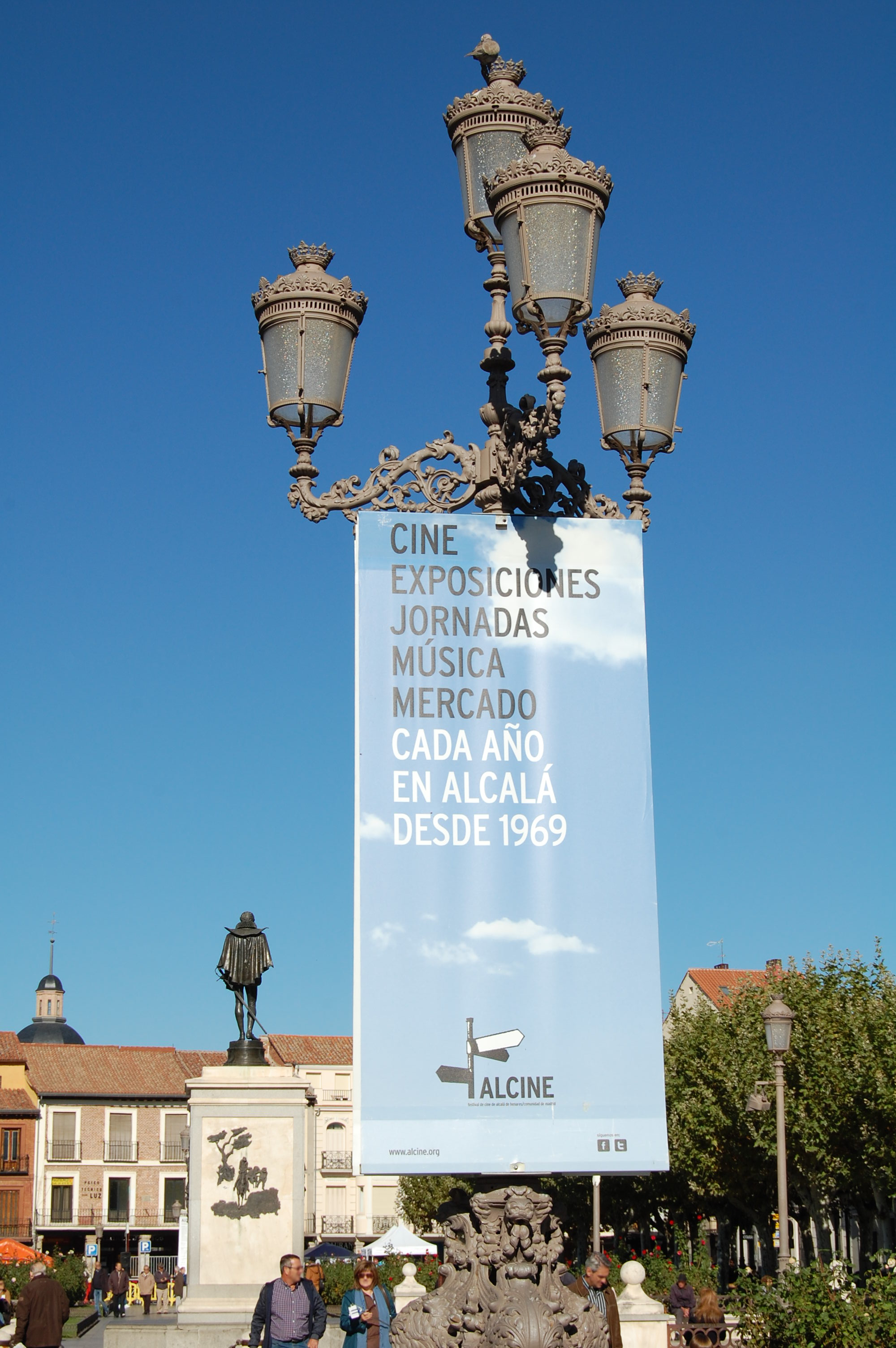 Cartel anunciador del Festival de Cine de Alcalá de Henares (ALCINE) en la plaza de Cervantes (Comunidad de Madrid - España).